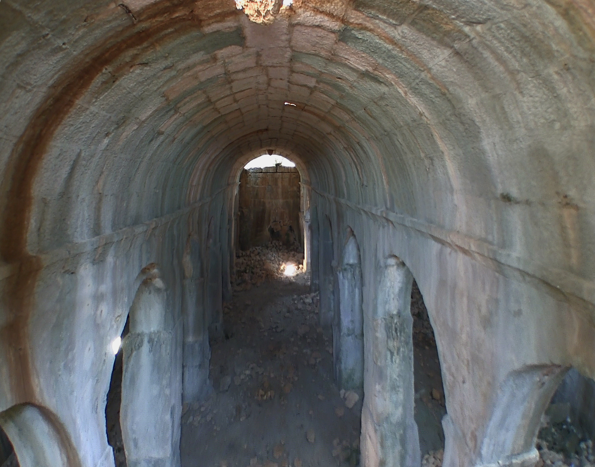 Akkale, byzantinischer Ruinenkomplex bei Kızkalesi, Südtürkei, Innenraum der Zisterne